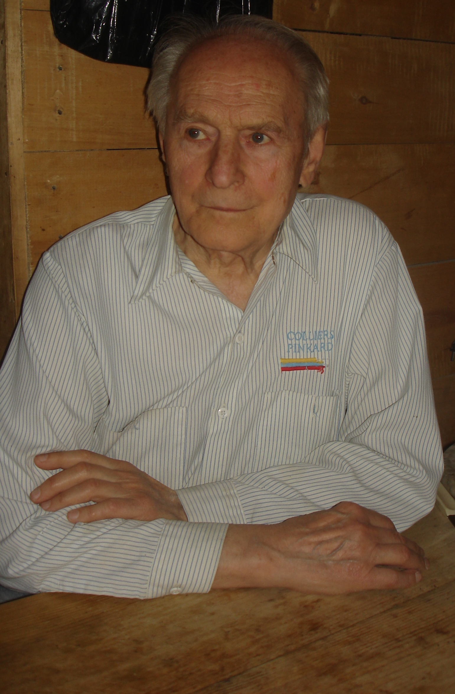 заслужений діяч мистецтв, скульптор Довгань Борис Степанович